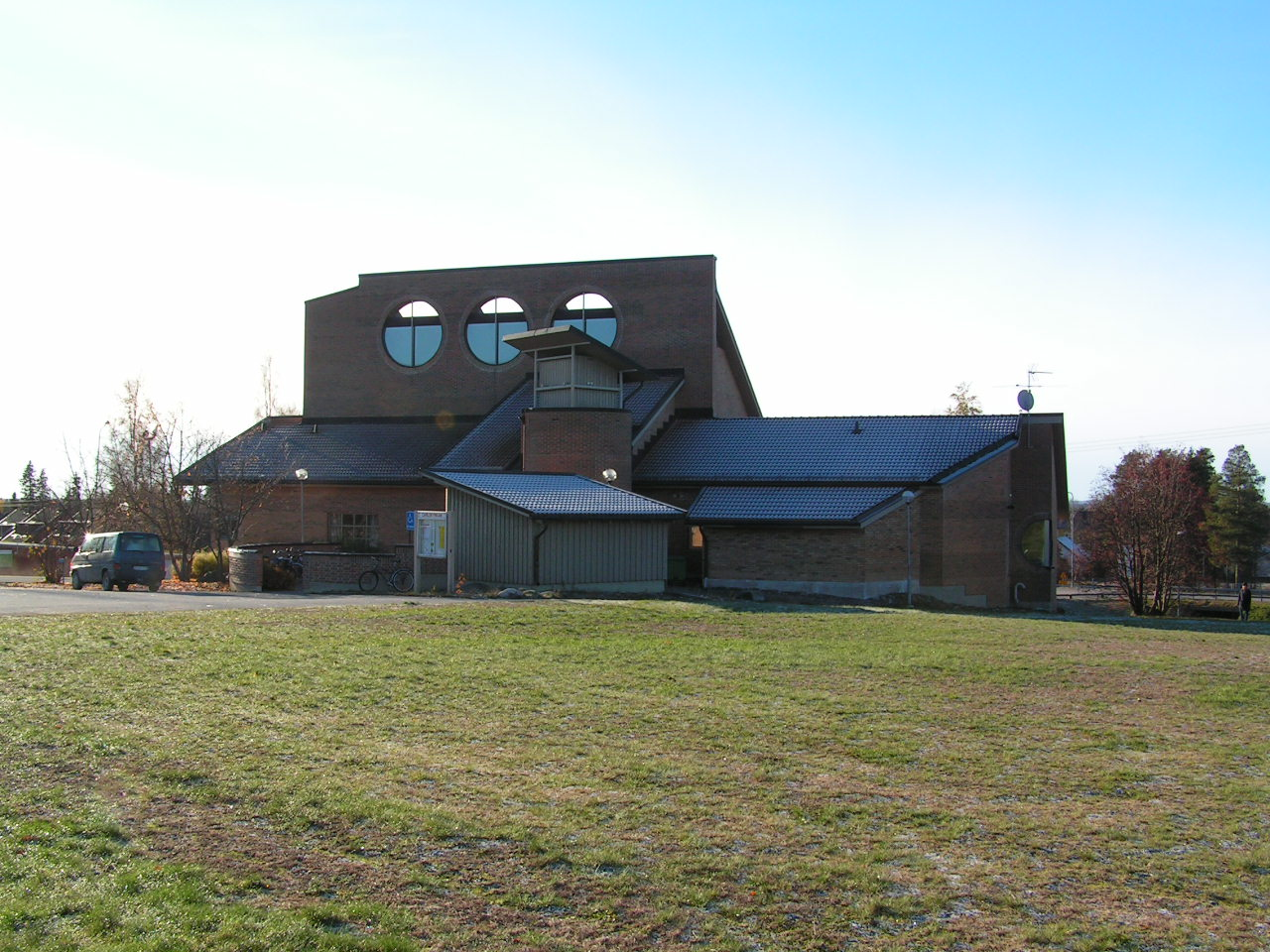 Carls Church, Umeå (Carlskyrka, Umeå)